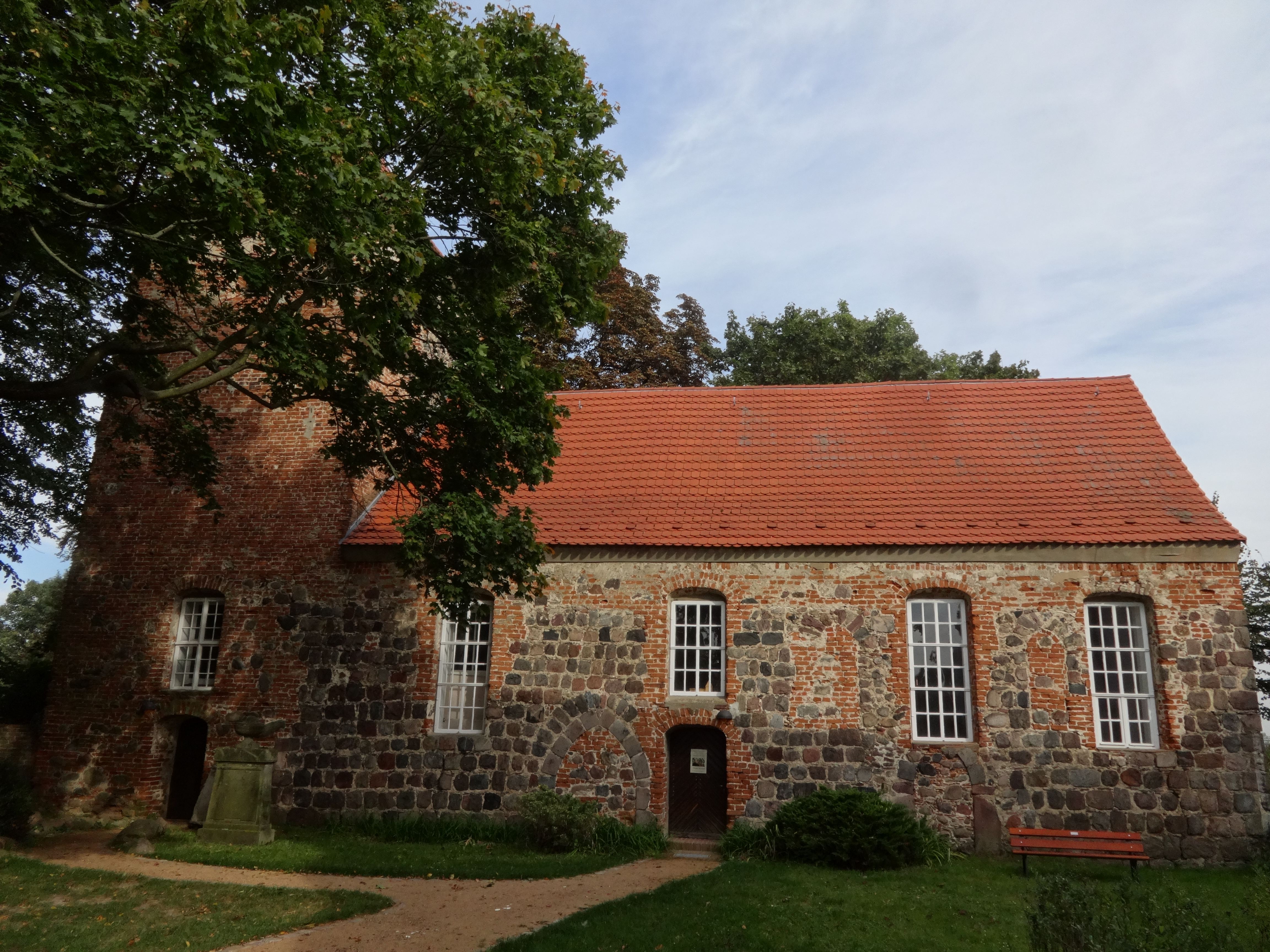 Die Dorfkirche in Kleinbeeren, Gemeinde Großbeeren im Landkreis Teltow-Fläming im Land Brandenburg entstand in der zweiten Hälfte des 13. Jahrhunderts. Im Innern steht unter anderem ein Kanzelaltar aus der Zeit um 1700.